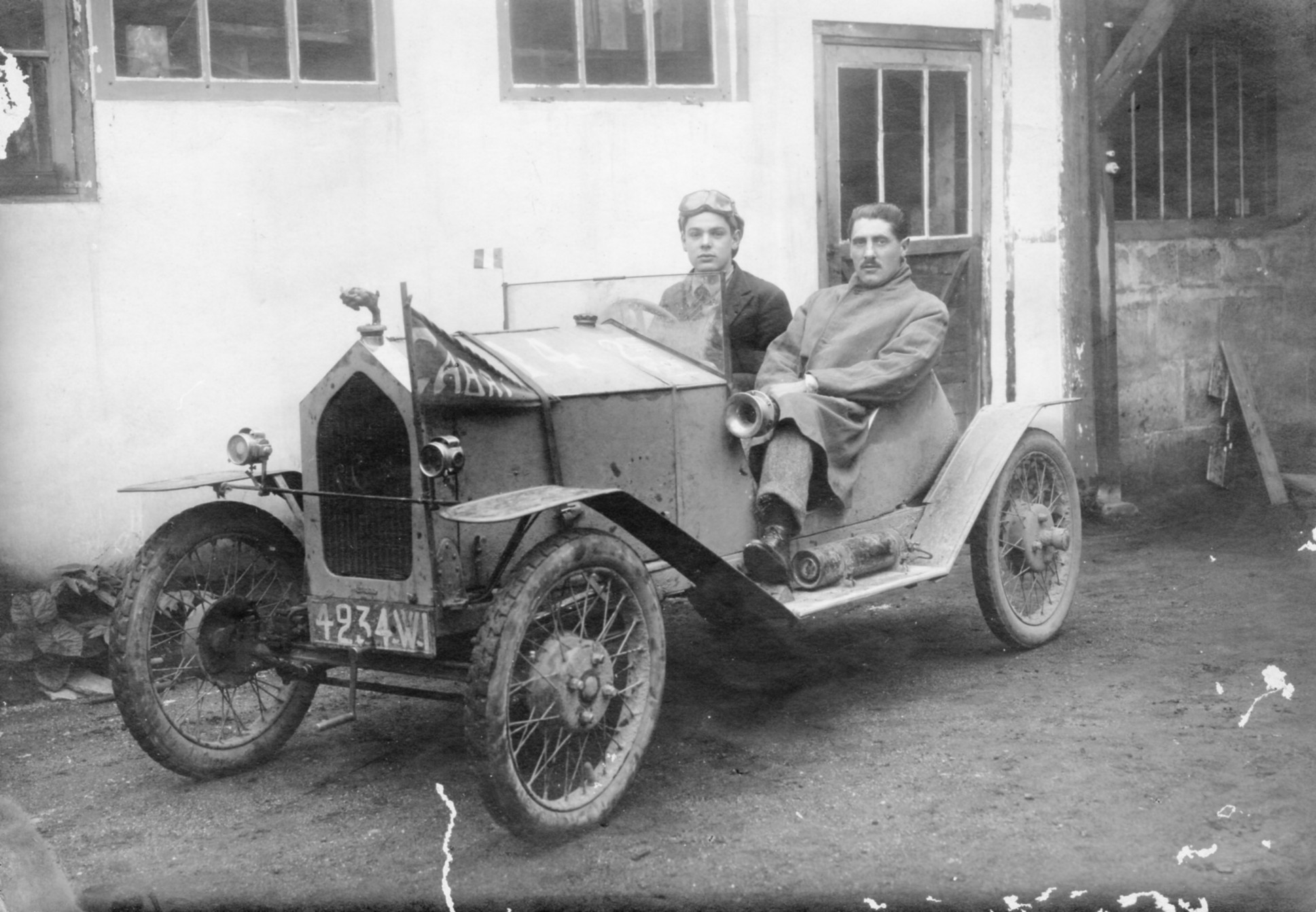 Marcel Cabon au volant de la voiture Le Cabri